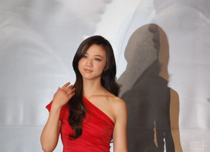 만추 시사회